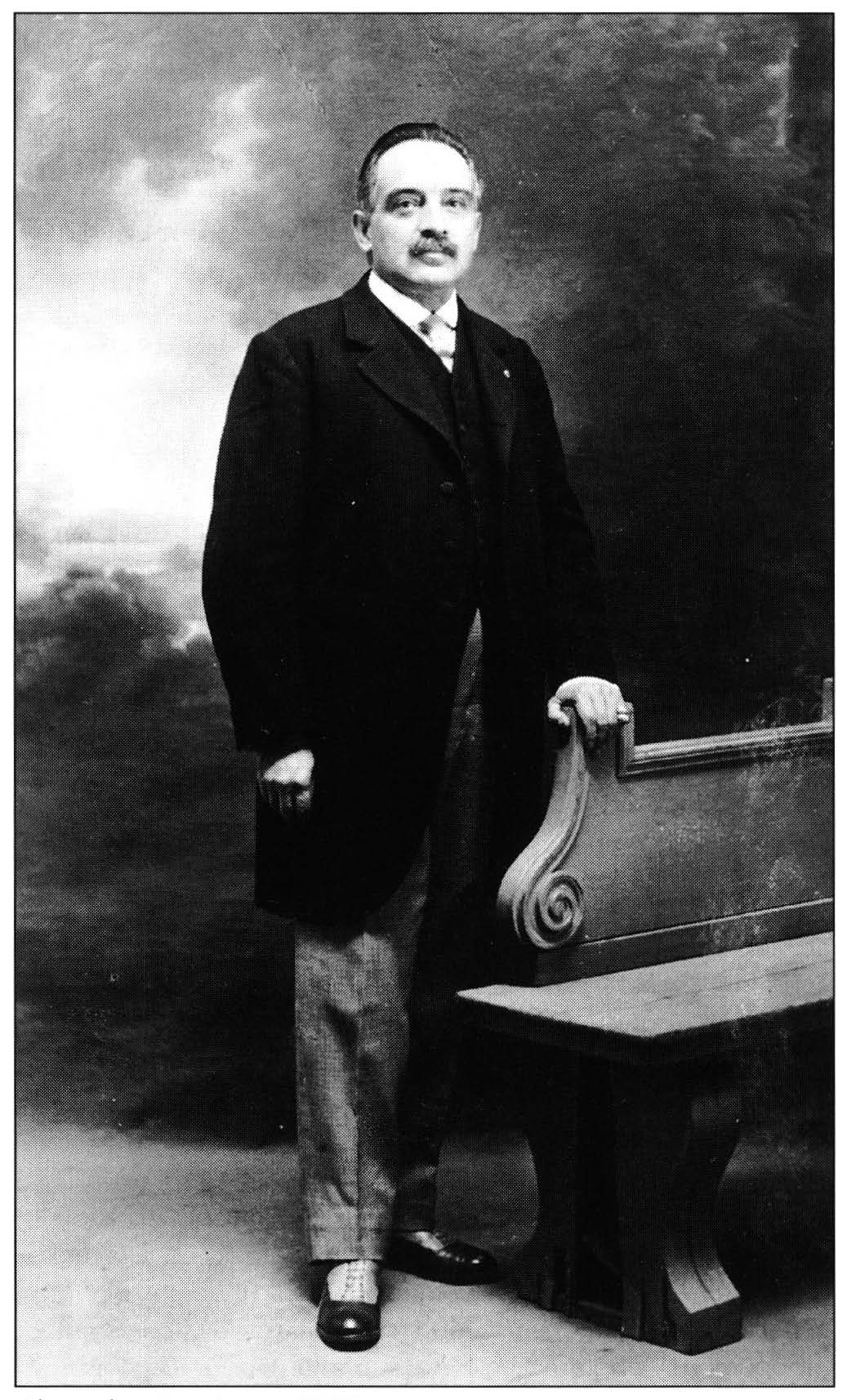 Alexandre Promio, l'un des premiers réalisateurs de cinéma, proche des Frères Lumière